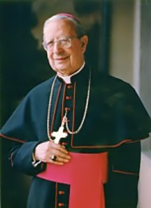 Alvaro del Portillo, Opus Dei Prelate, bishop, 1982 - 1994.